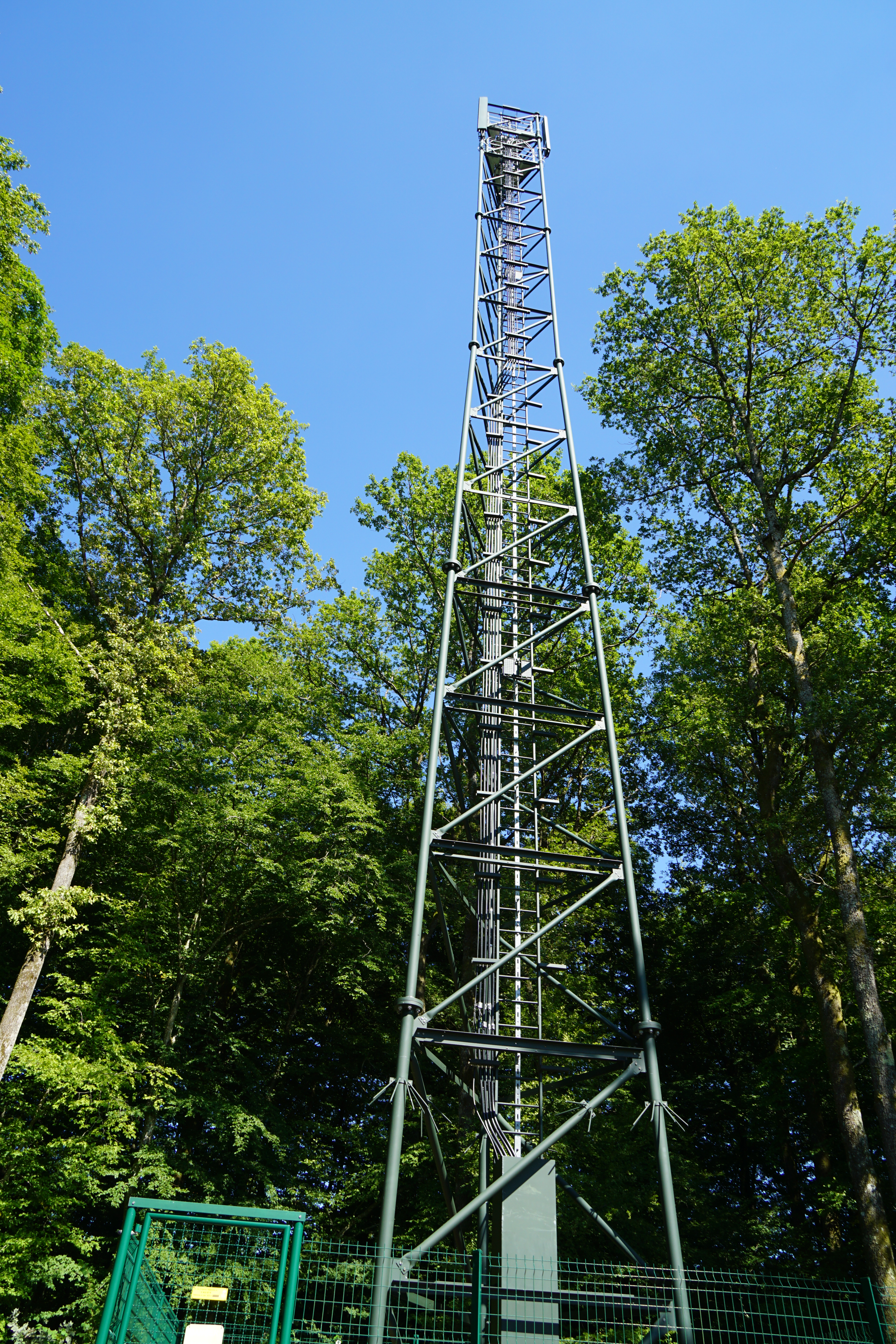 Antenne de télécomunication Clairegoutte.